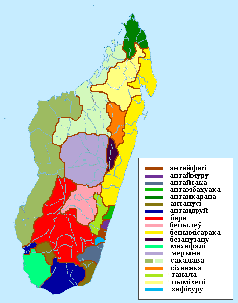 Этнічныя групы Мадагаскара